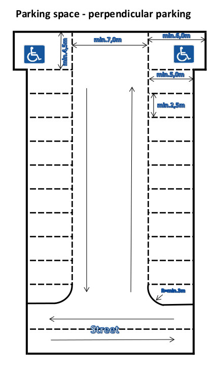 Standard mål for parkeringsplasser